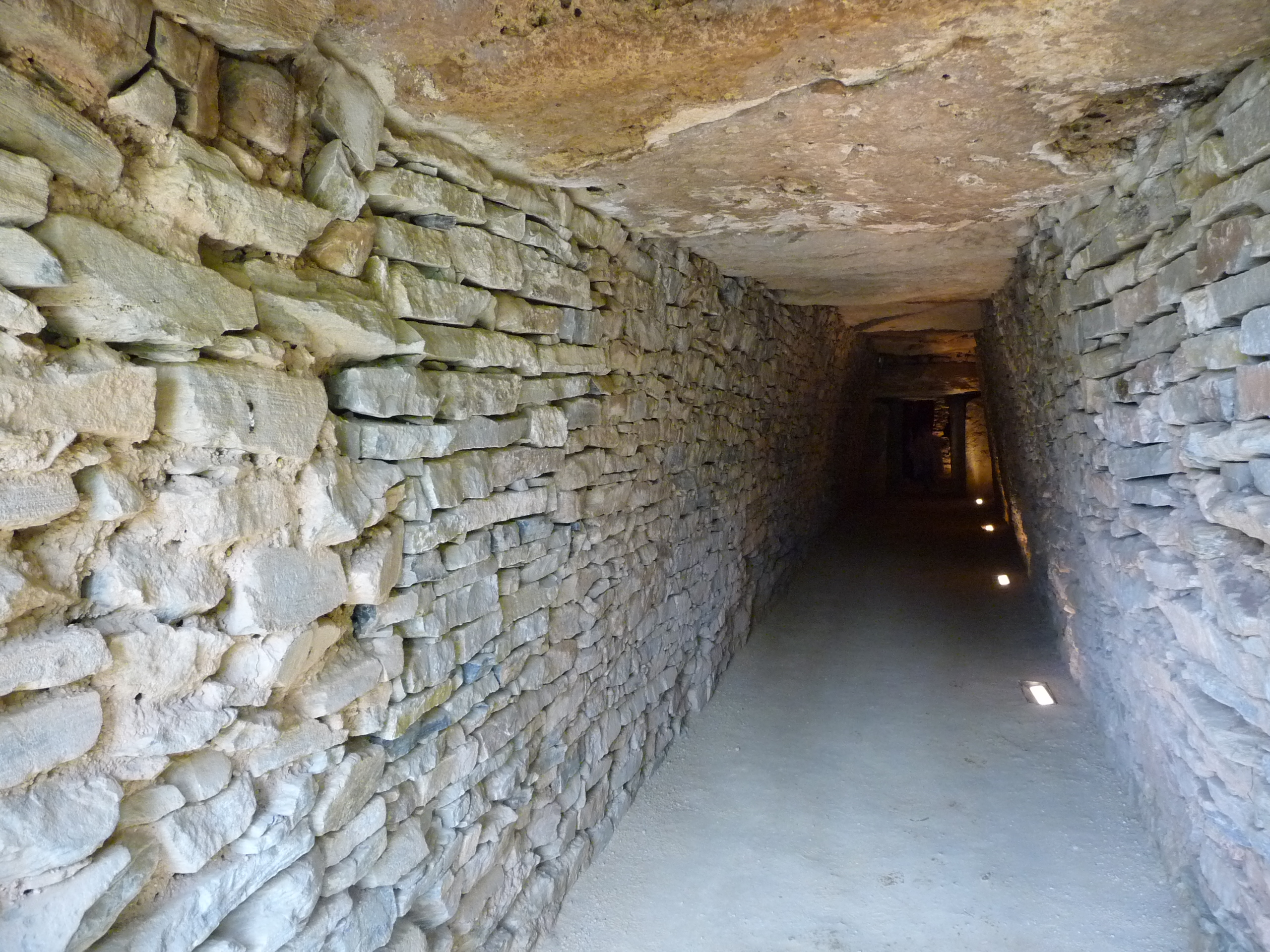 Antequera-p1010865.jpg